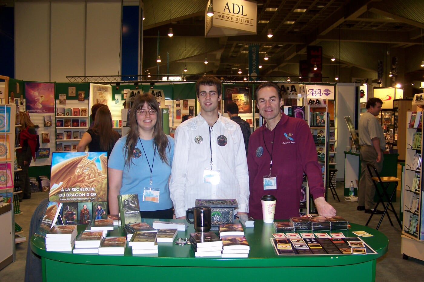 LLDD Salon de Montreal